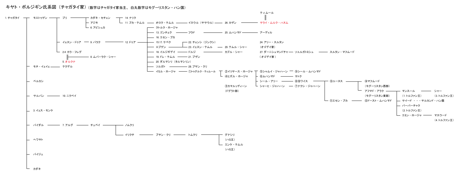 チャガタイ・ウルスから東西チャガタイ・ハン国に至る系図。